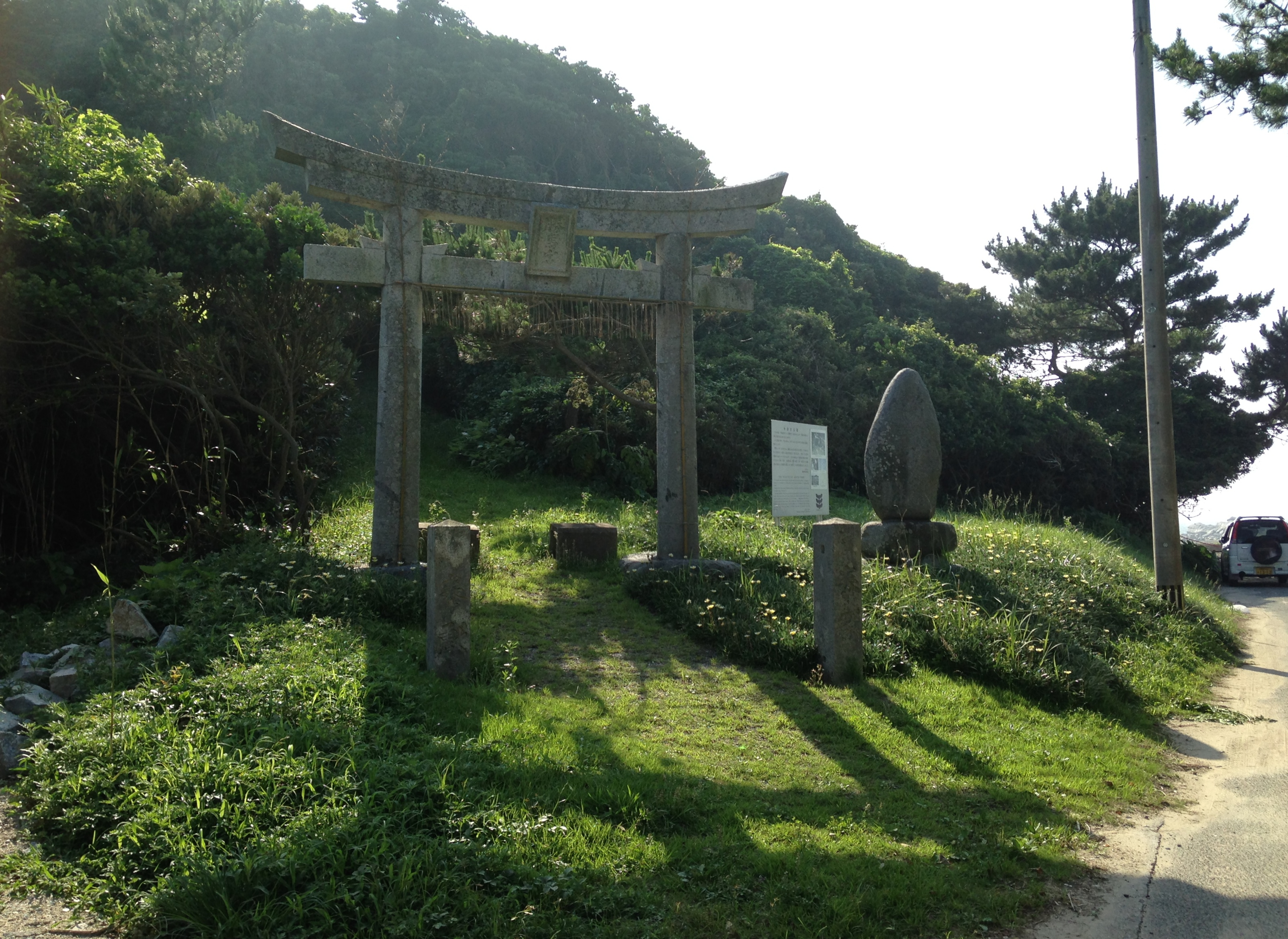 勝馬宮(志賀海神社の中津宮)の鳥居